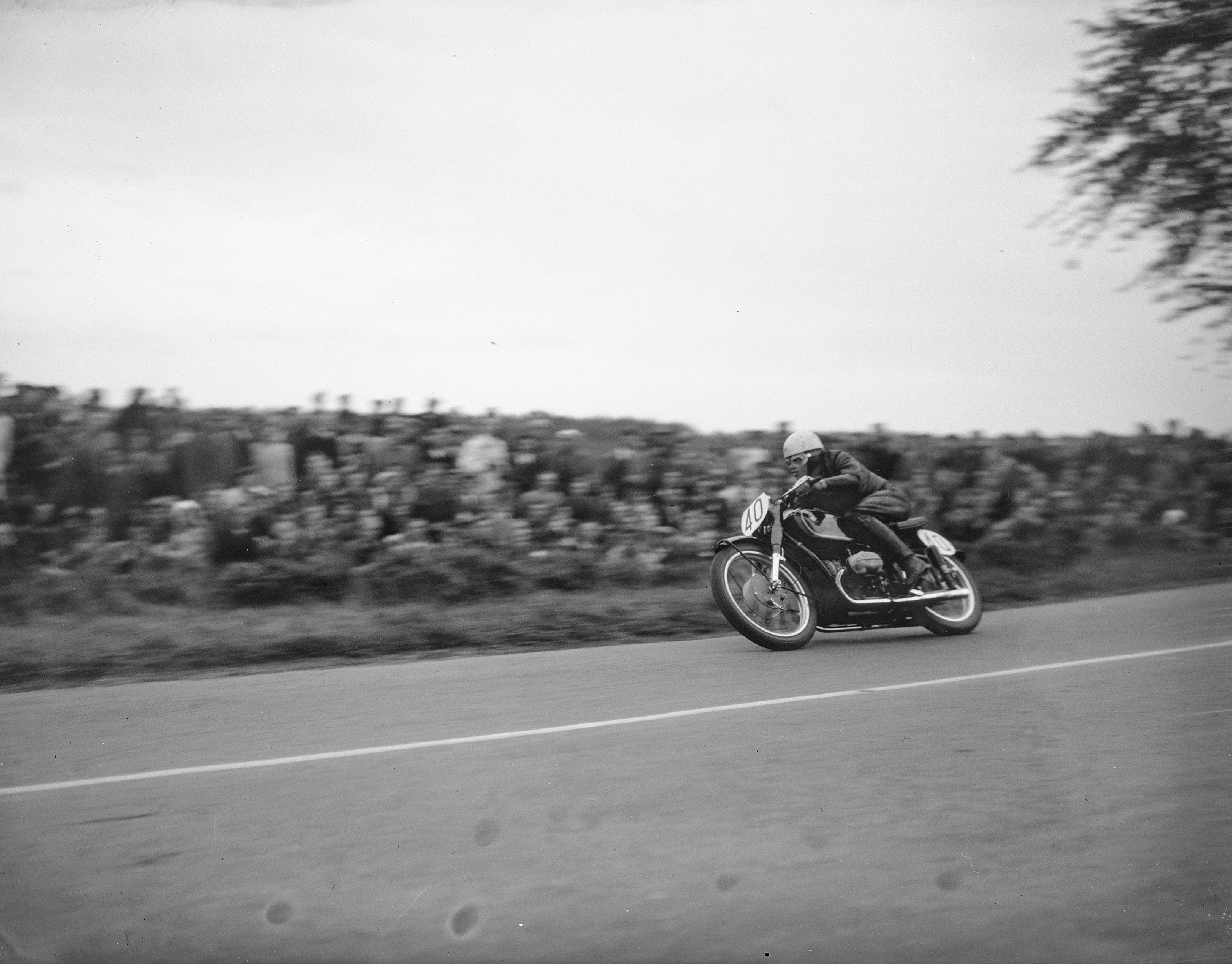 Collectie / Archief : Fotocollectie Anefo Reportage / Serie : TT Assen 1946 Beschrijving : Piet Knijnenburg op BMW wint het hoofdnummer (500cc) Datum : 14 september 1946 Locatie : Assen Trefwoorden : motorsport Persoonsnaam : Knijnenburg, Piet Instellingsnaam : TT Fotograaf : Fotograaf Onbekend / Anefo Auteursrechthebbende : Nationaal Archief Materiaalsoort : Glasnegatief Nummer archiefinventaris : bekijk toegang 2.24.01.09 Bestanddeelnummer : 901-9140